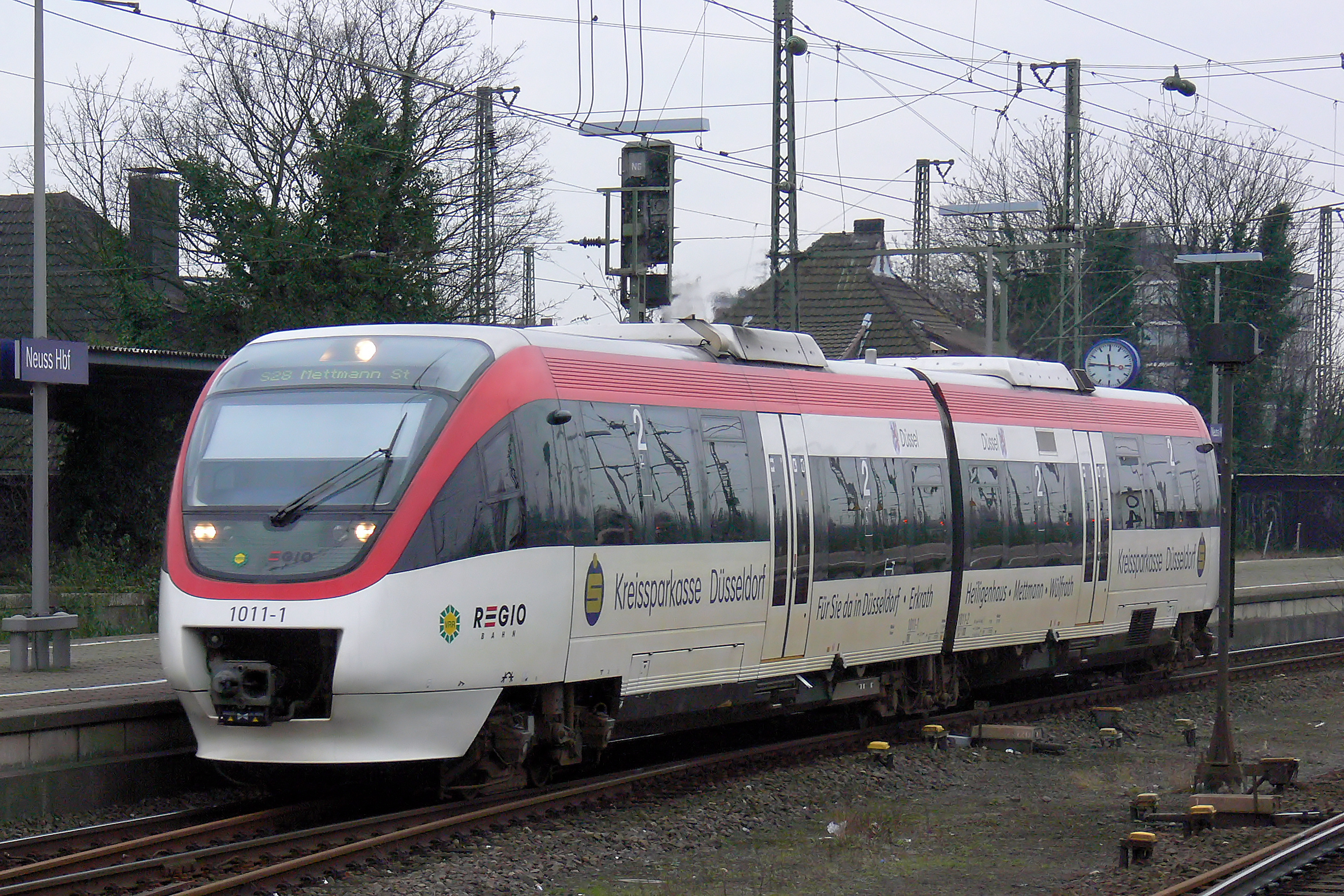 Bombardier Talent der Regiobahn GmbH in Neuss Hauptbahnhof